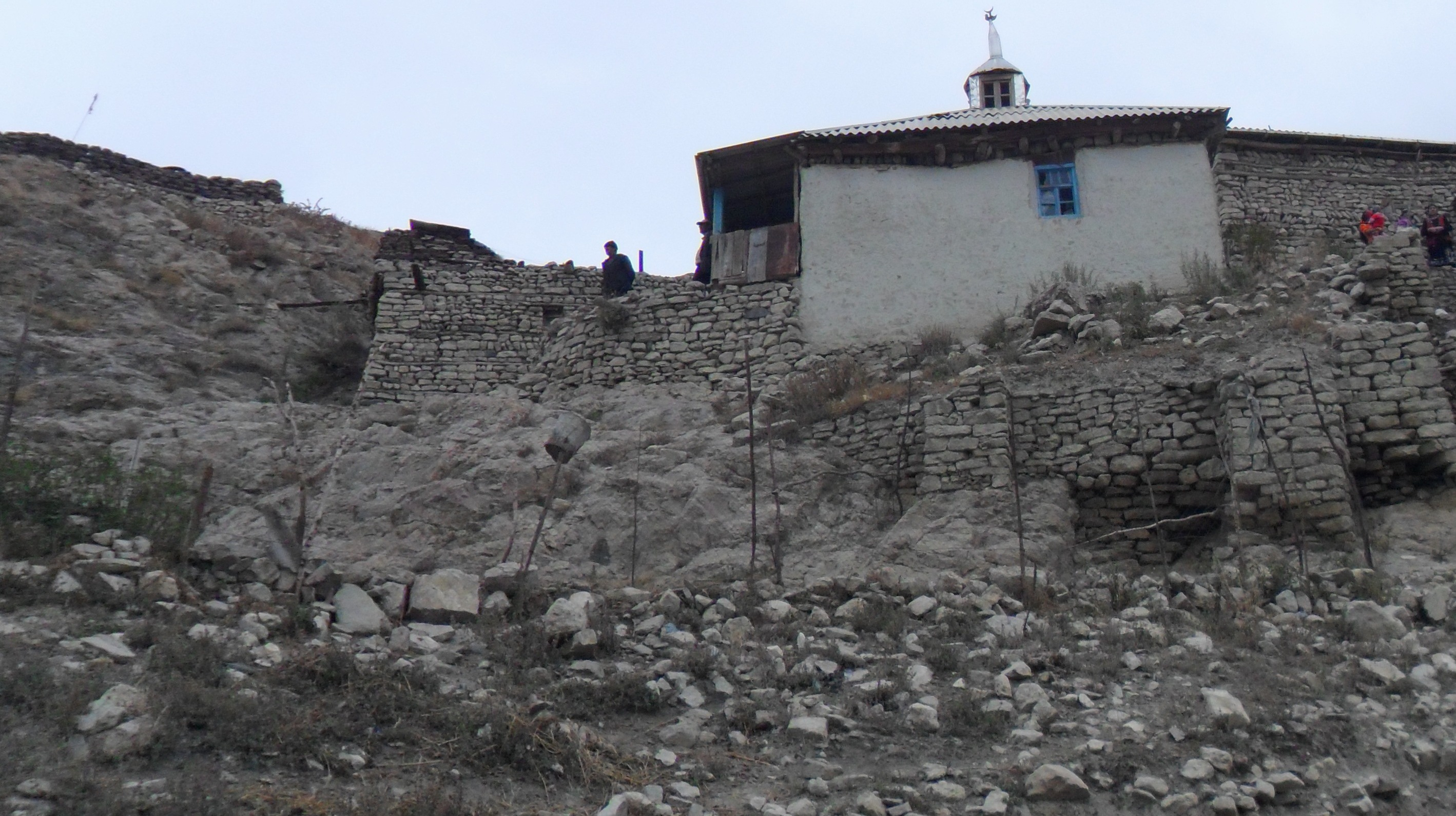 Əbu Müslim məscidi (Cek)